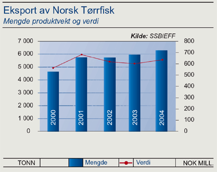 Faksimile av graf som viser Norges tørrfiskeksport 2004.